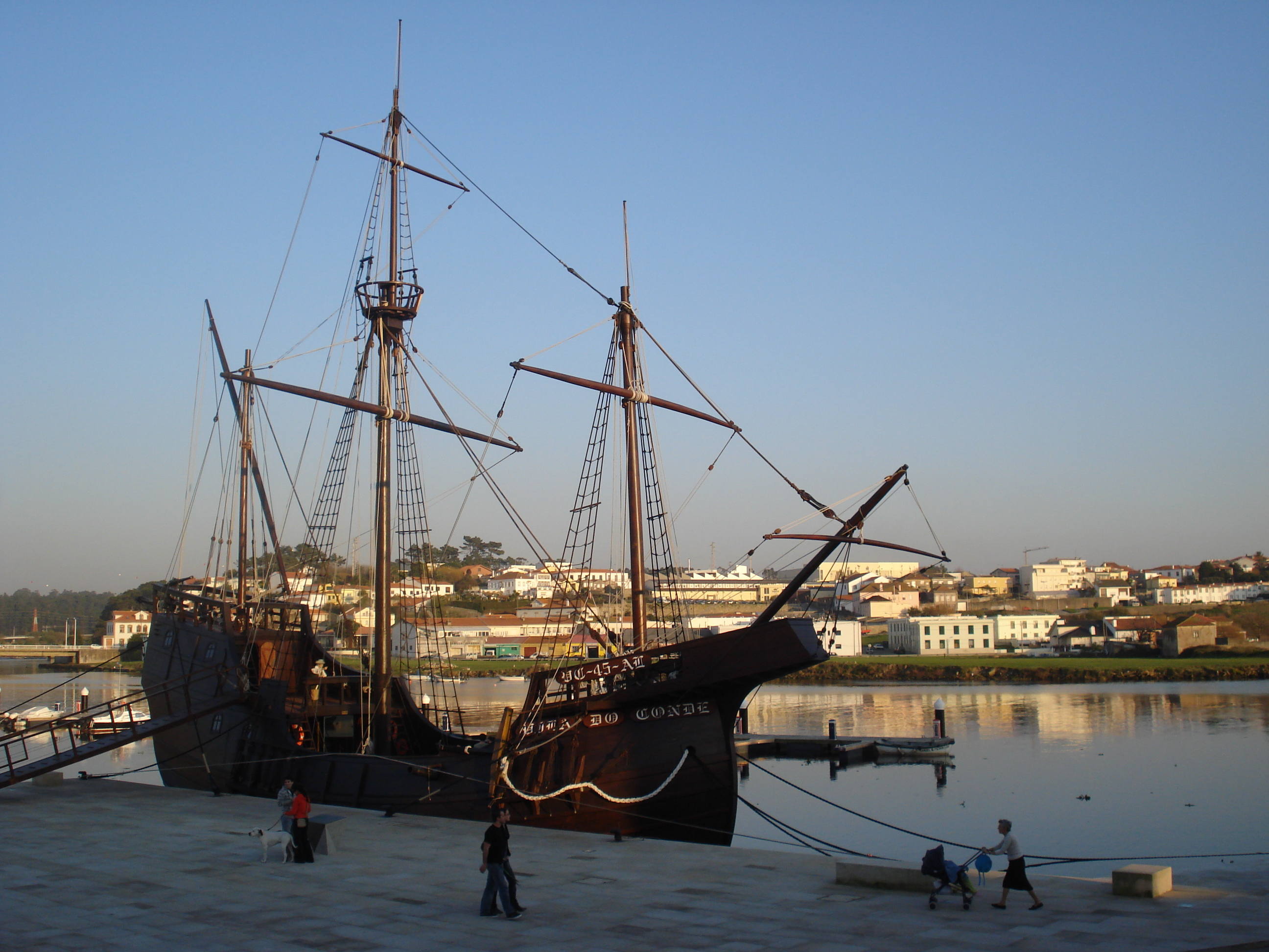 Réplica de antiga Nau em frente à antiga Alfândega, agora em esposição permanente.